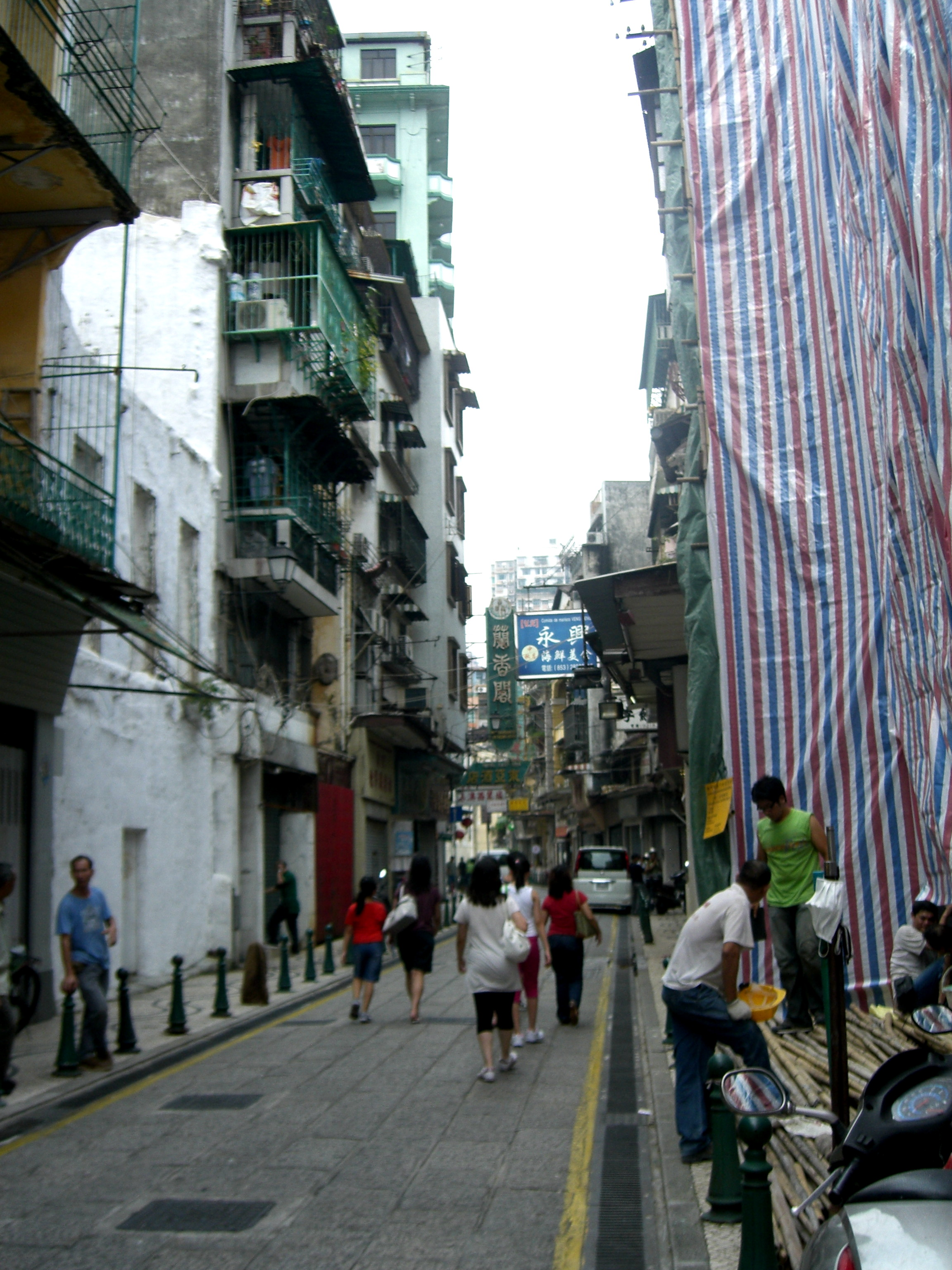 Rua de Cinco de Outubro